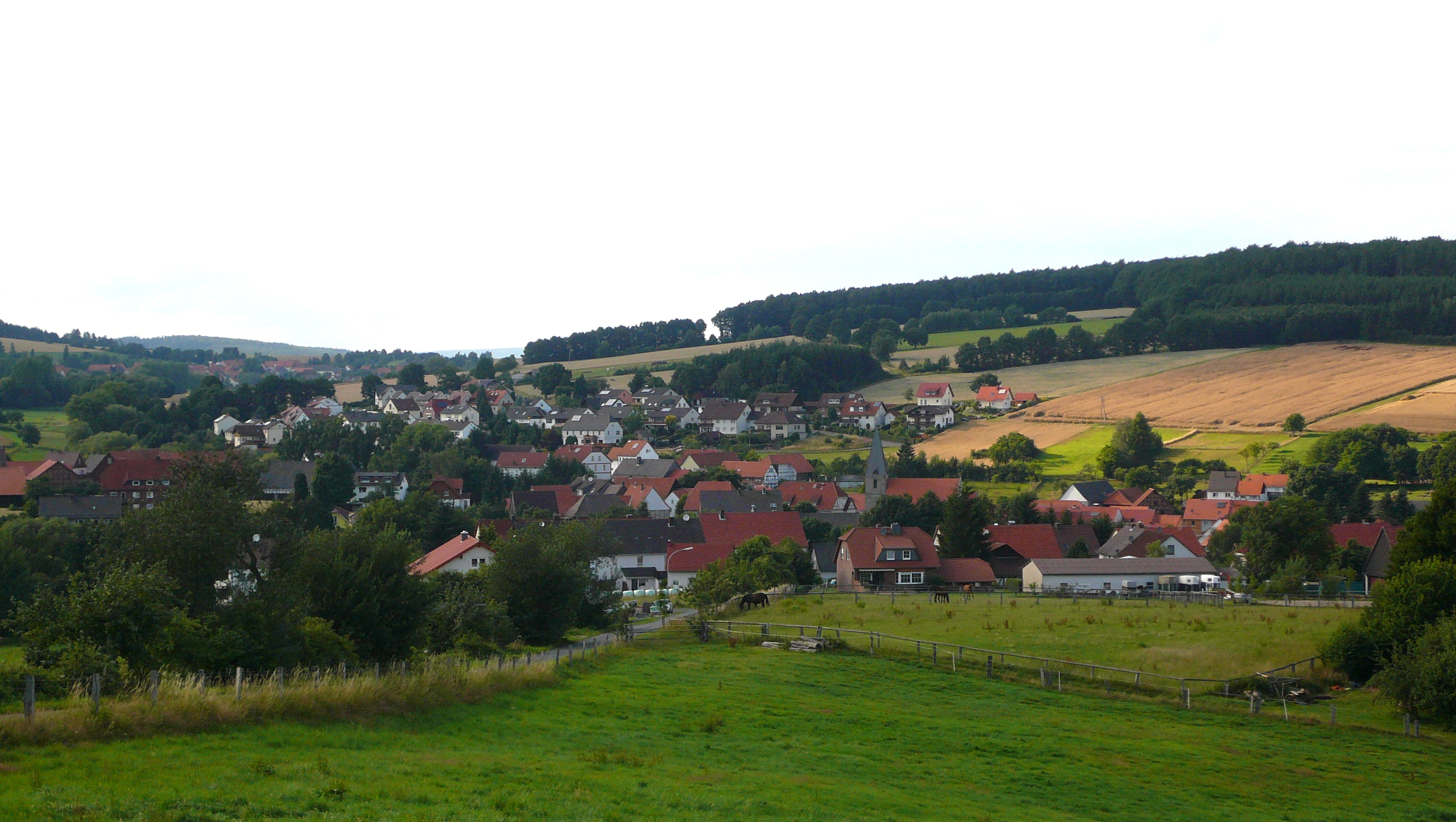 Blick von Südsüdosten auf den Ortskern von Heisebeck, Gemeinde Oberweser, Landkreis Kassel, Hessen